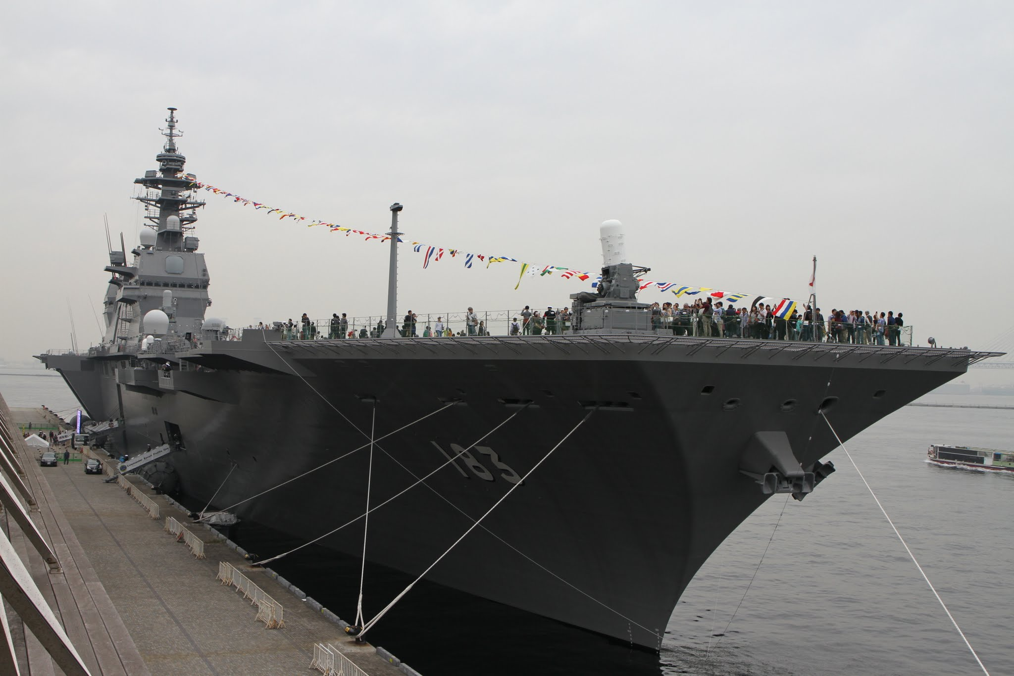 横浜港・大桟橋で一般公開中の護衛艦いずも。